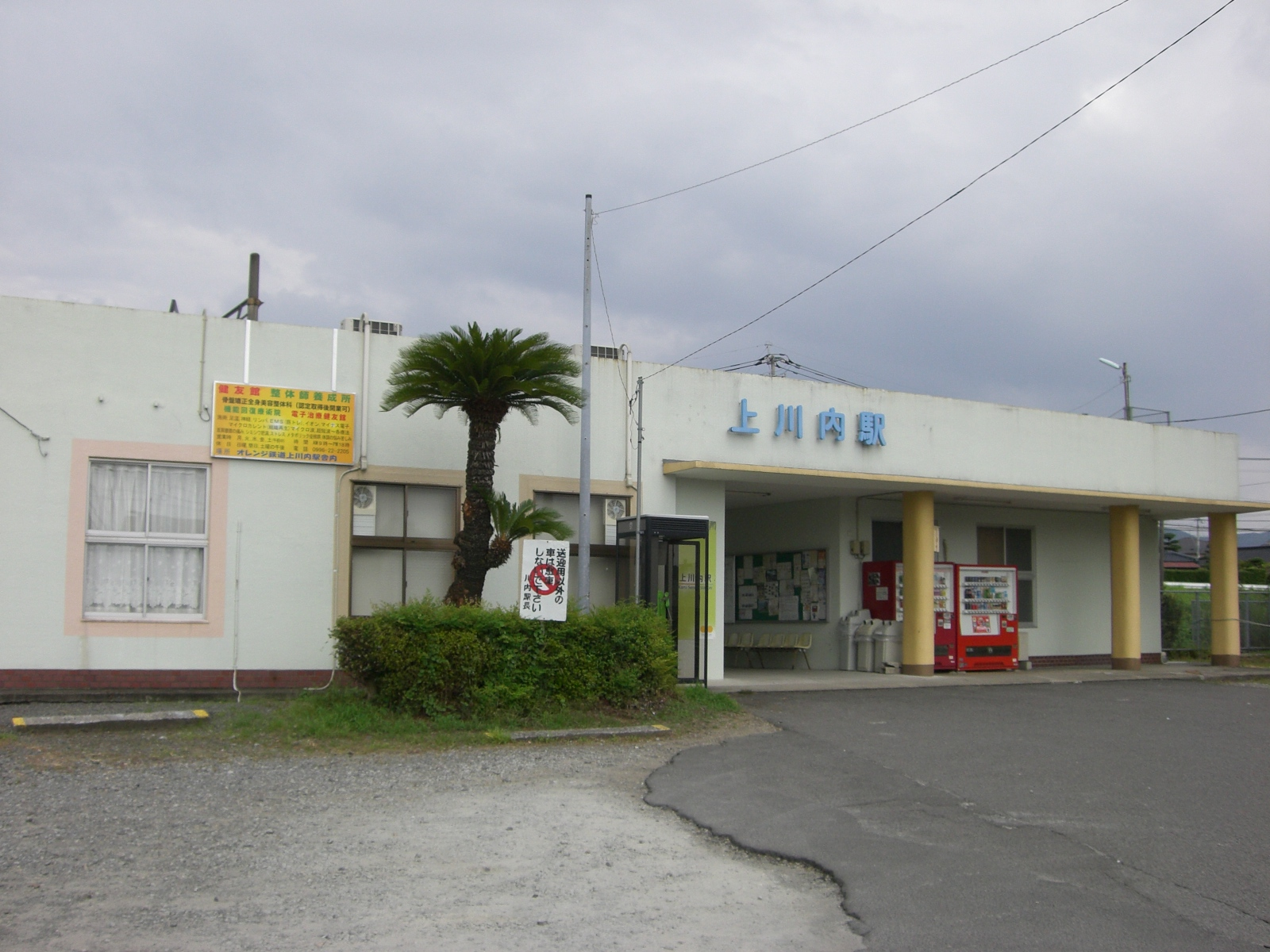 上川内駅